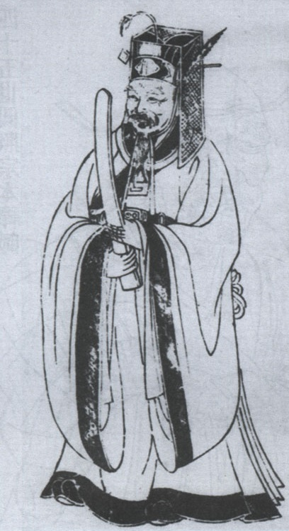 中國宋代閩南籍科學家--蘇頌。